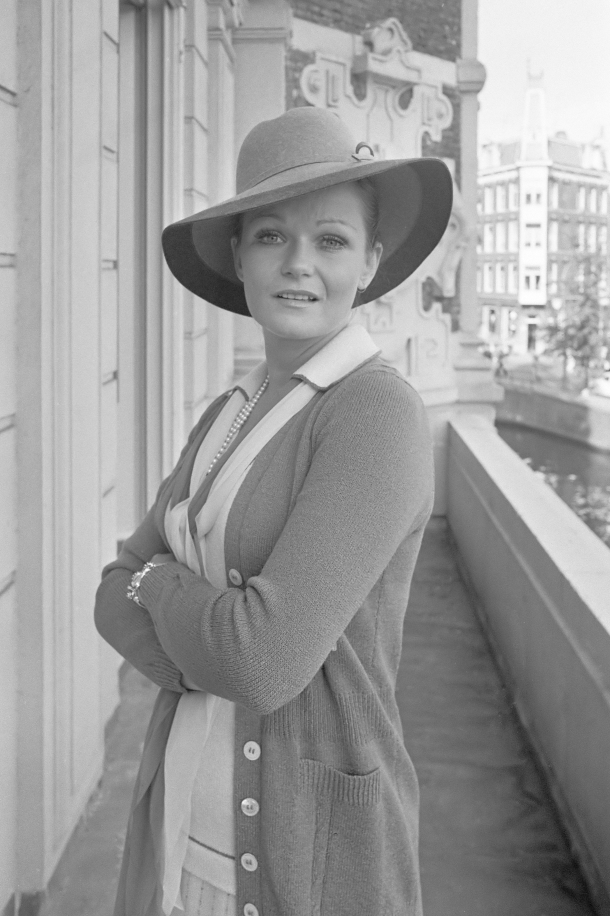 Fotoshoot van actrice Valerie Perrine, i.v.m. haar rol in de nieuwe film "Lenny". Valery op een balkon in Amsterdam 26 augustus 1975